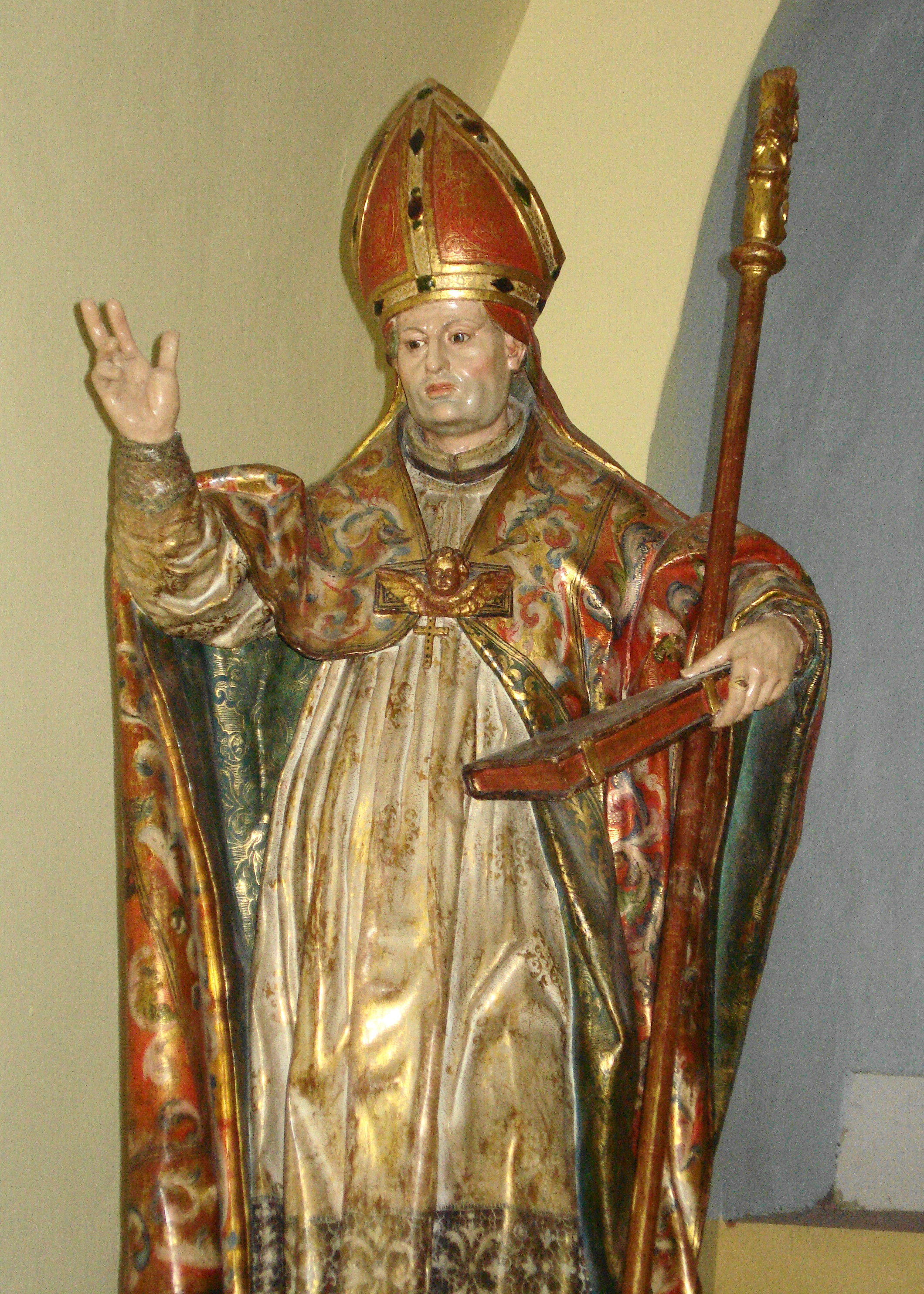 Santo Toribio